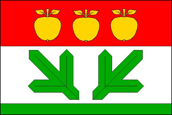 Vlajka obce Boleboř